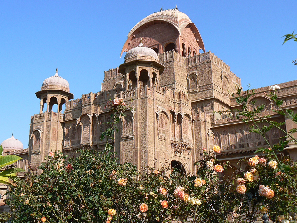 Lalgarh Palace in Bikaner, Rajasthan, India